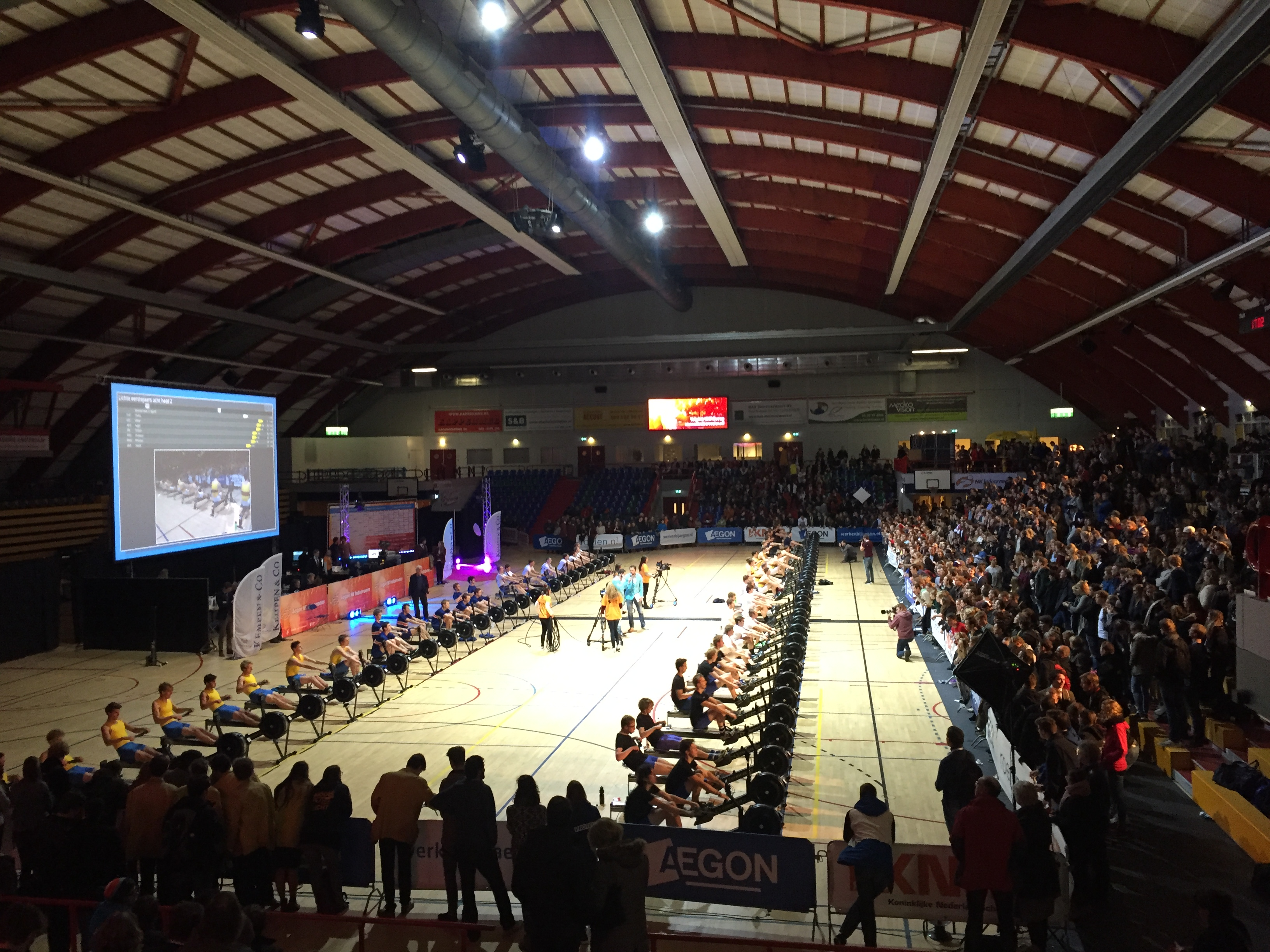 Nederlands Kampioenschap Indoorroeien 2015 in Sporthallen Zuid te Amsterdam